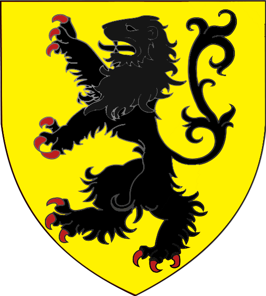 Armories des comtes de Lyon et de Forez d'après J.M. de La Mure.